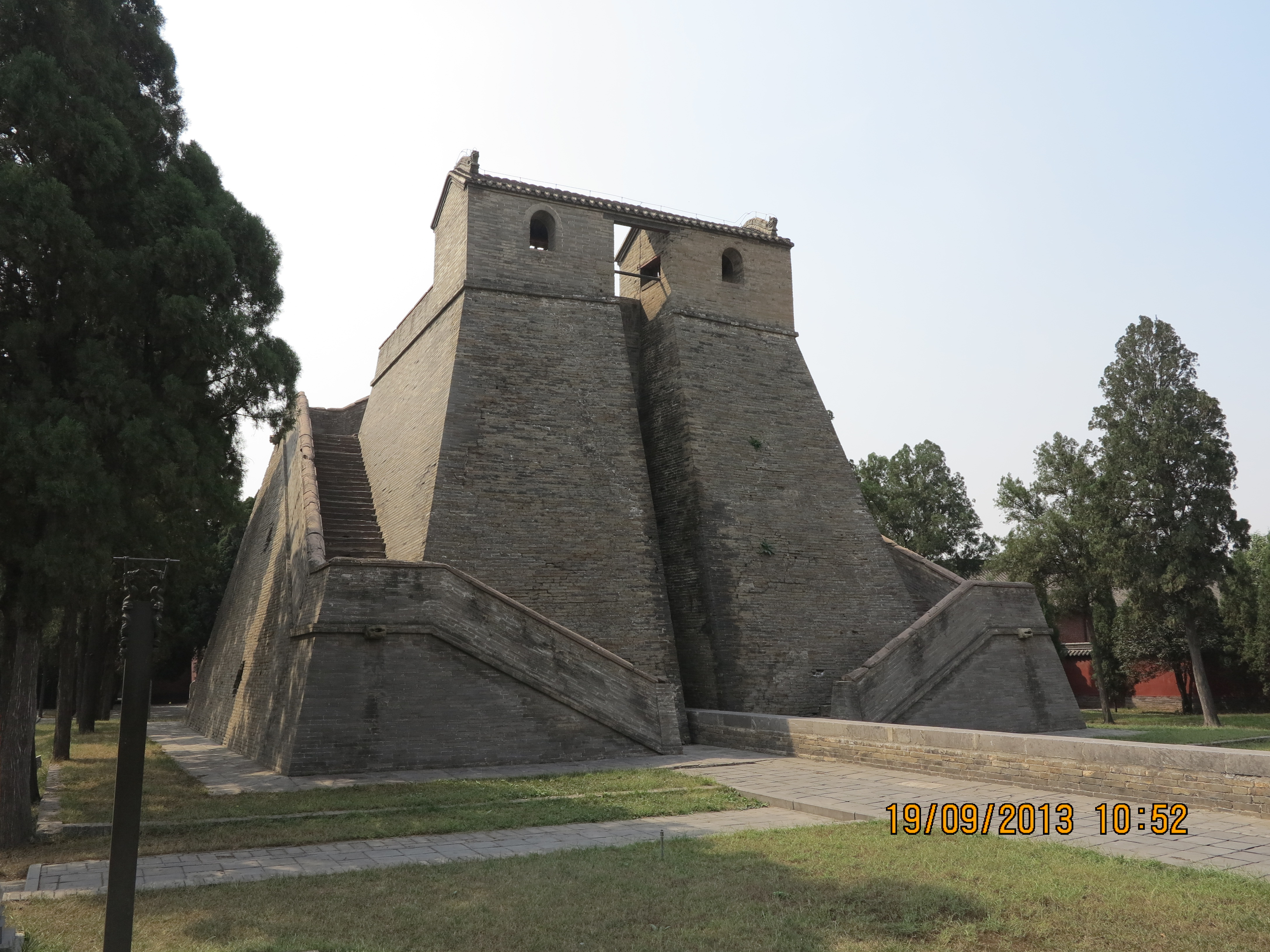 中文（中国大陆）: 河南登封观星台